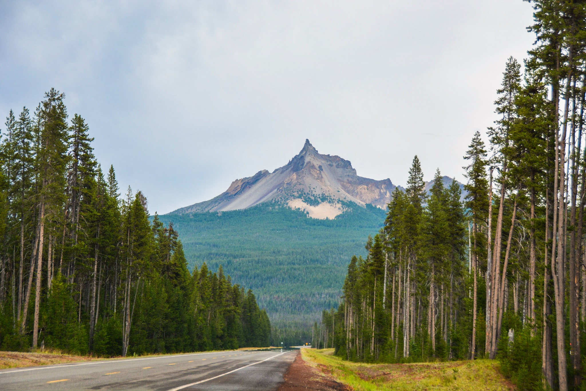 Mount Theilsen, Oregon